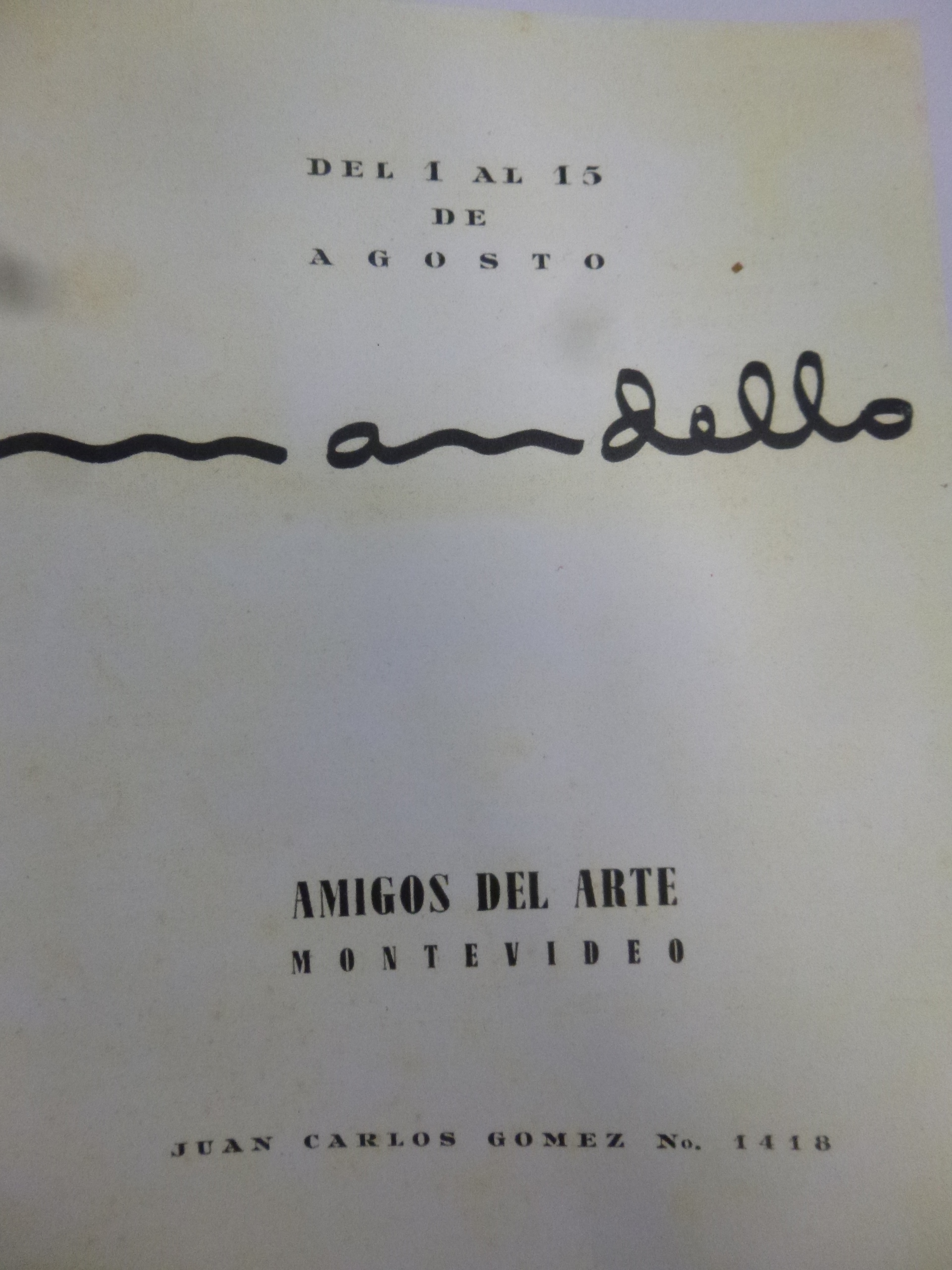 Exposición de fotografías de Mandello, Gallery Amigos del Arte, Montevideo, 1950 Title pages from Uruguay